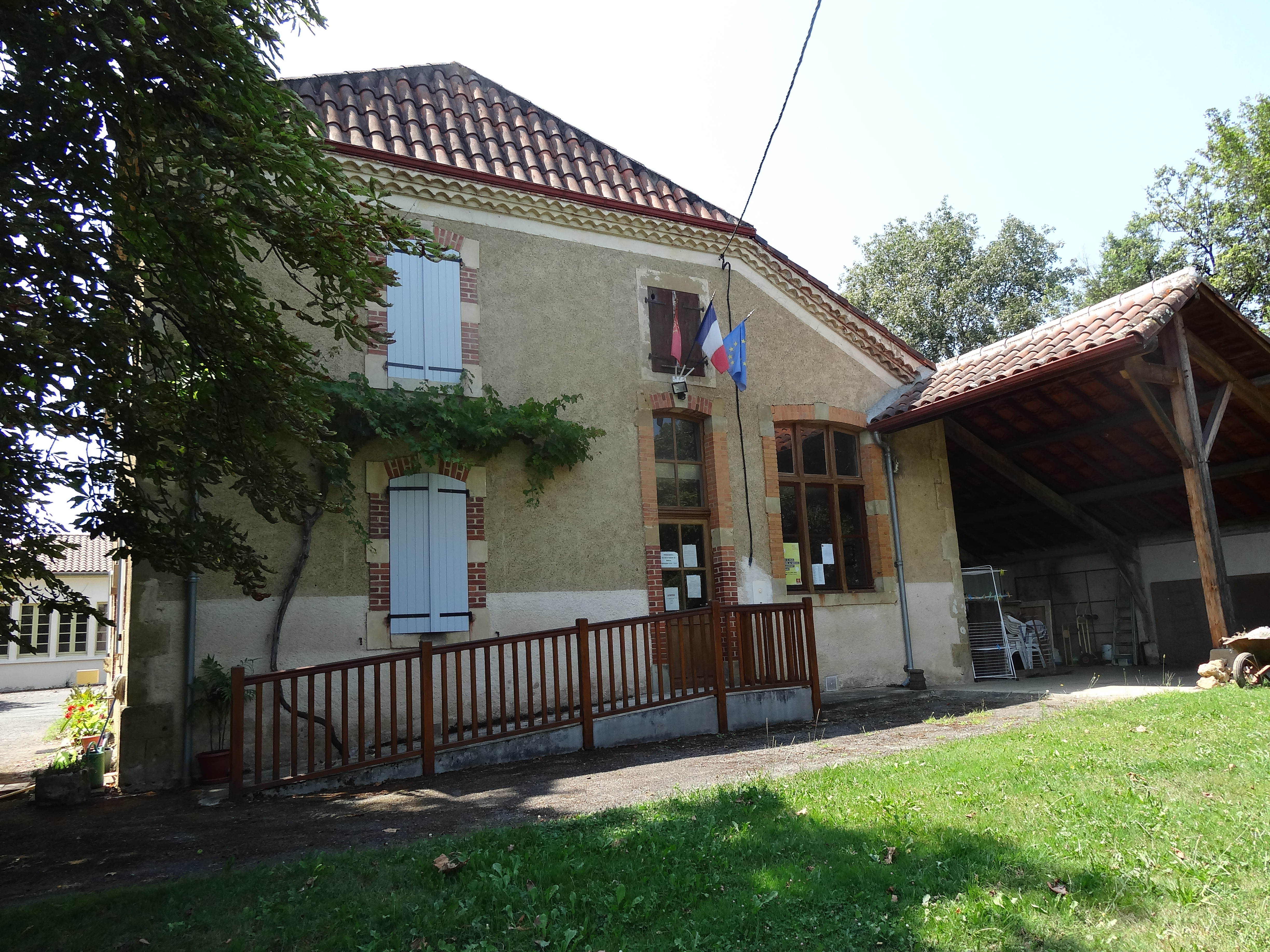 Mairie de Pallanne.